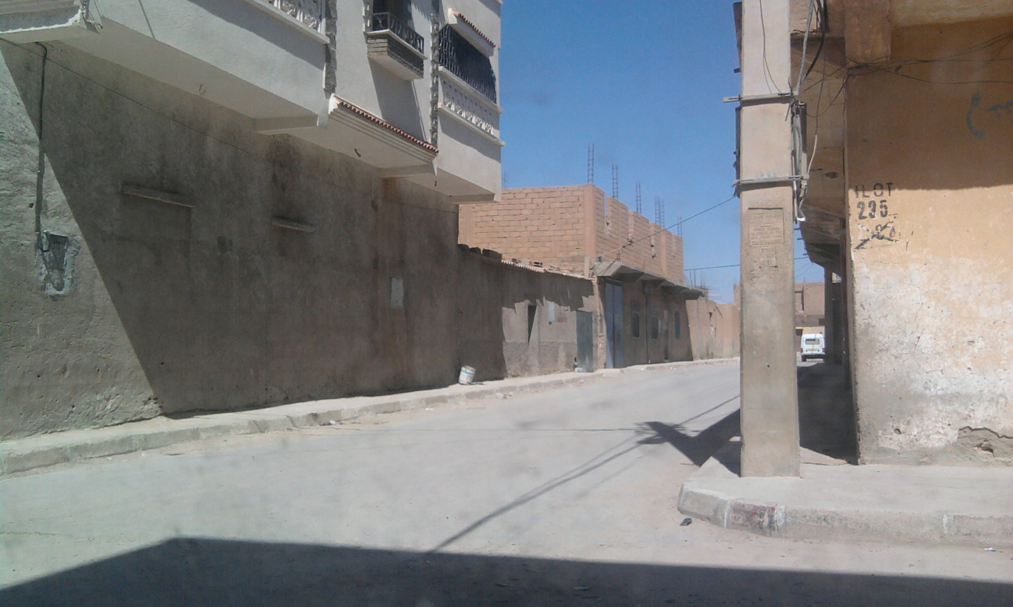 HAY EL MOHARIK